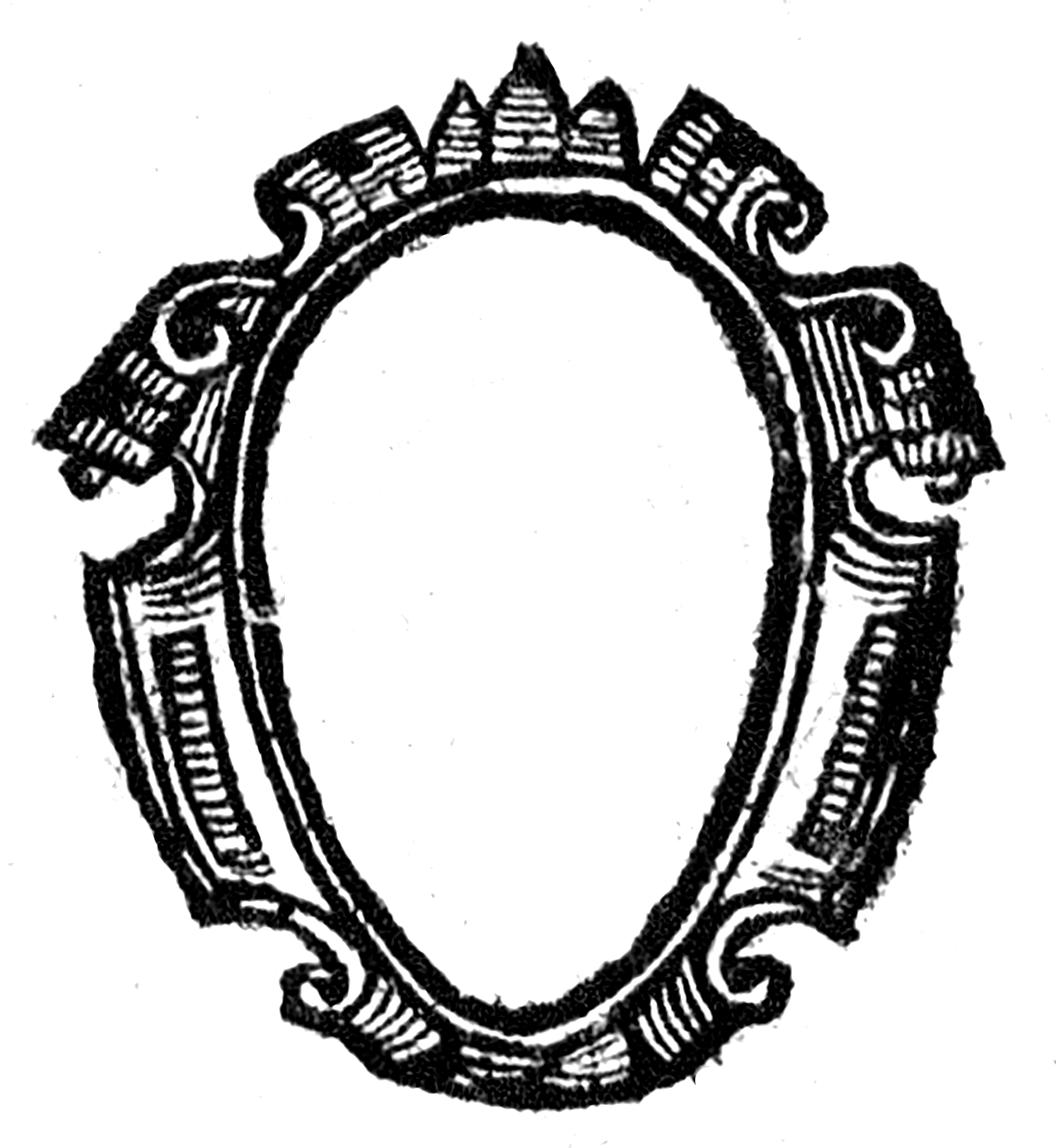 Herb Puste Pole (scutum vacuum ad omnia tamen depingenda aptum) z dewizą Depingere fas est